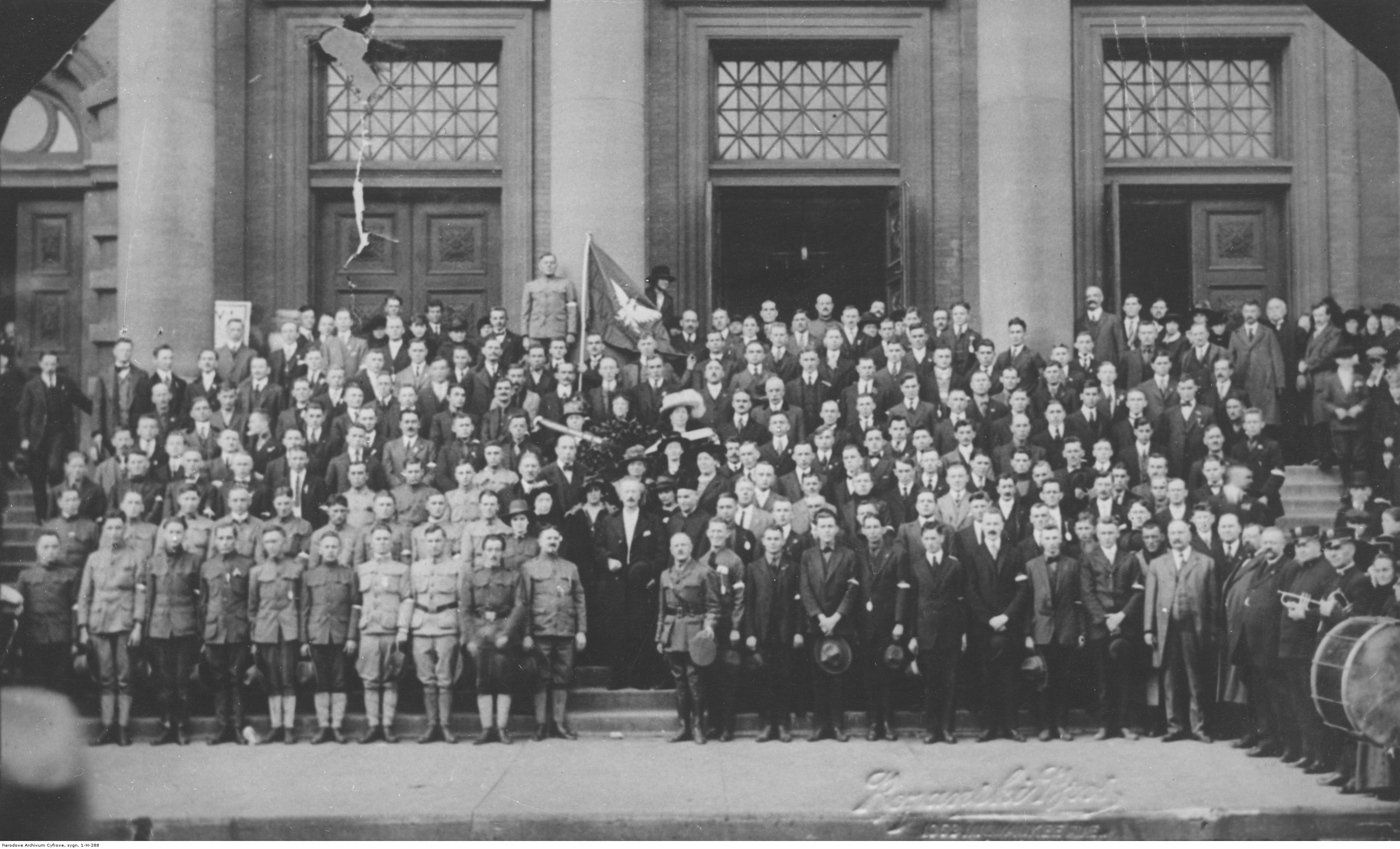 Grupa ochotników do Armii Polskiej we Francji - Chicago. Koncern Ilustrowany Kurier Codzienny - Archiwum Ilustracji. Sygnatura: 1-H-288